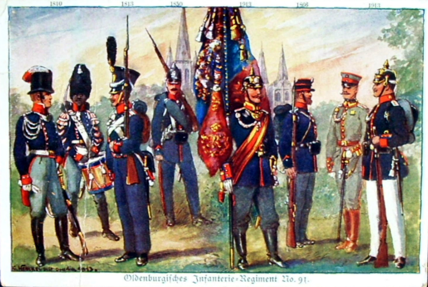 Uniformen des 91. Infanterie-Regiments